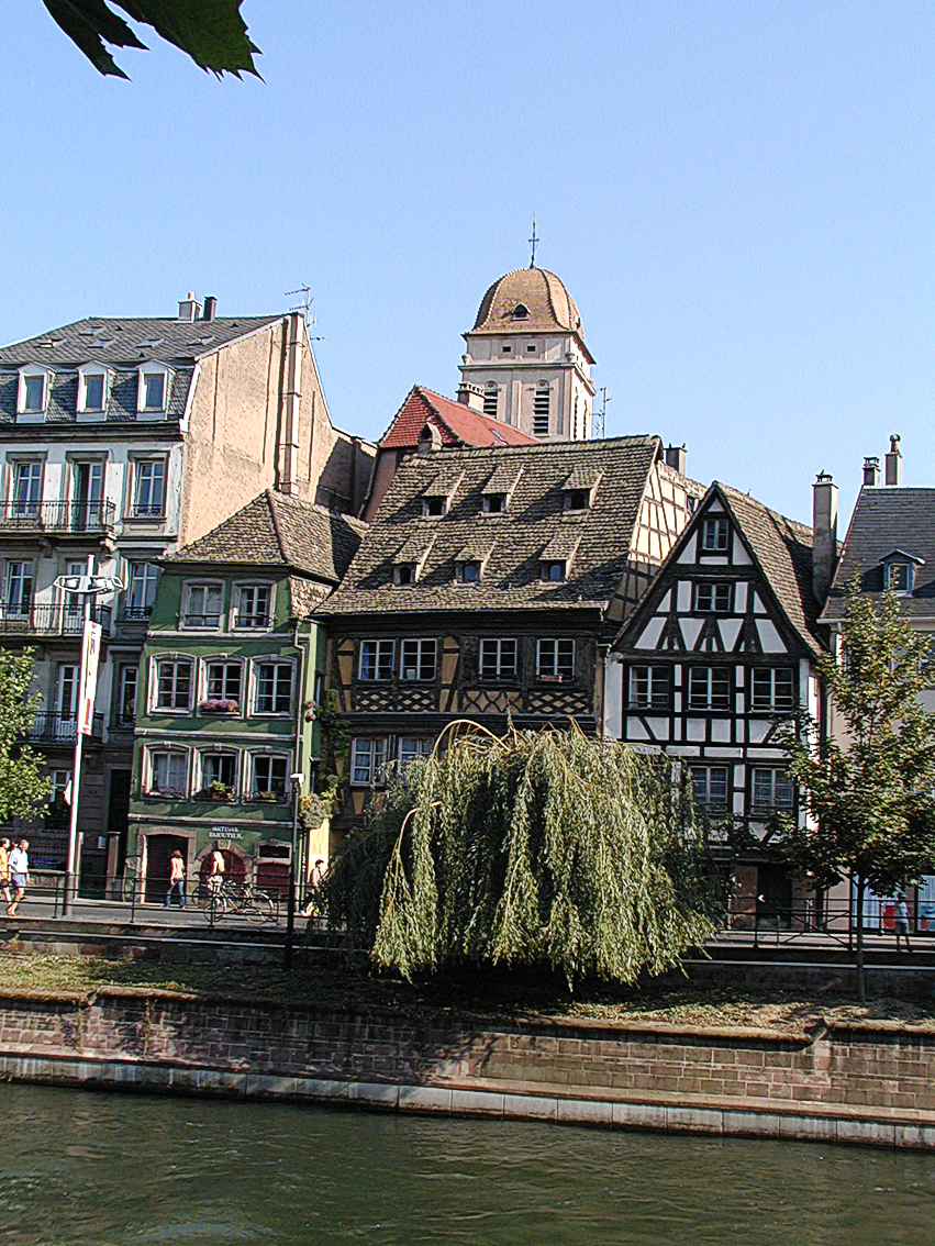 Straßburg